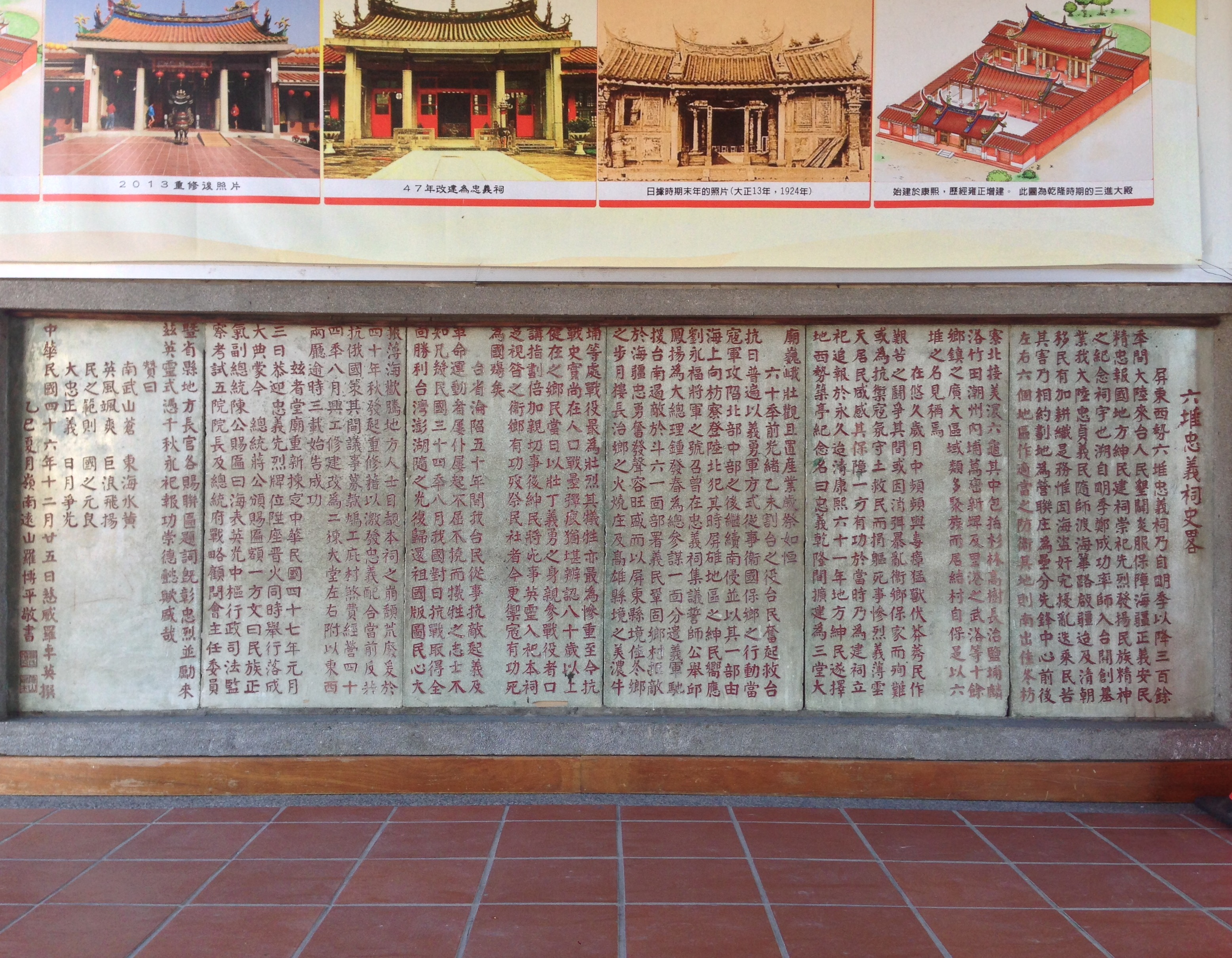 中文（台灣）: 六堆忠義祠史畧